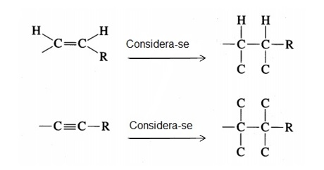 Configuração estereoquímica para duplas e triplas